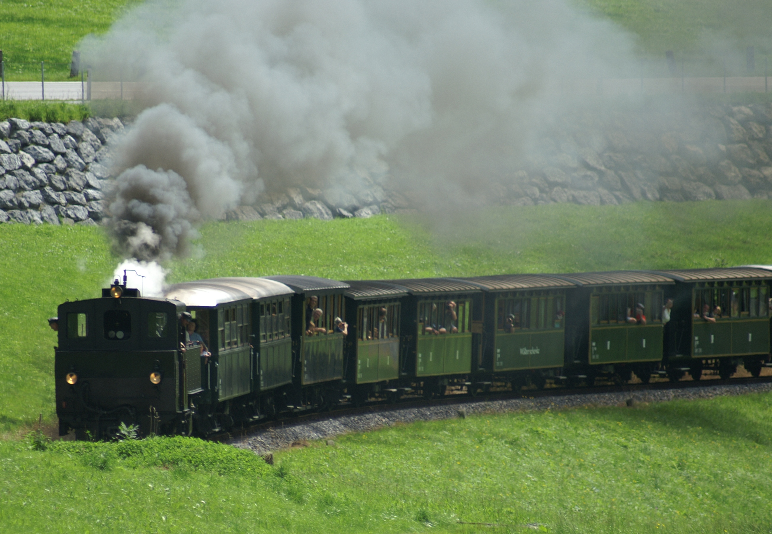 Schwarzenberg Bahnhof mit Museumsbahn "Wälderbähnle". in Vorarlberg